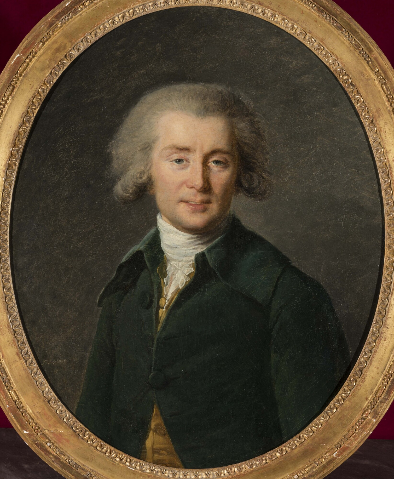 Portrait of André Ernest Modeste Grétry (1741-1813), French composer